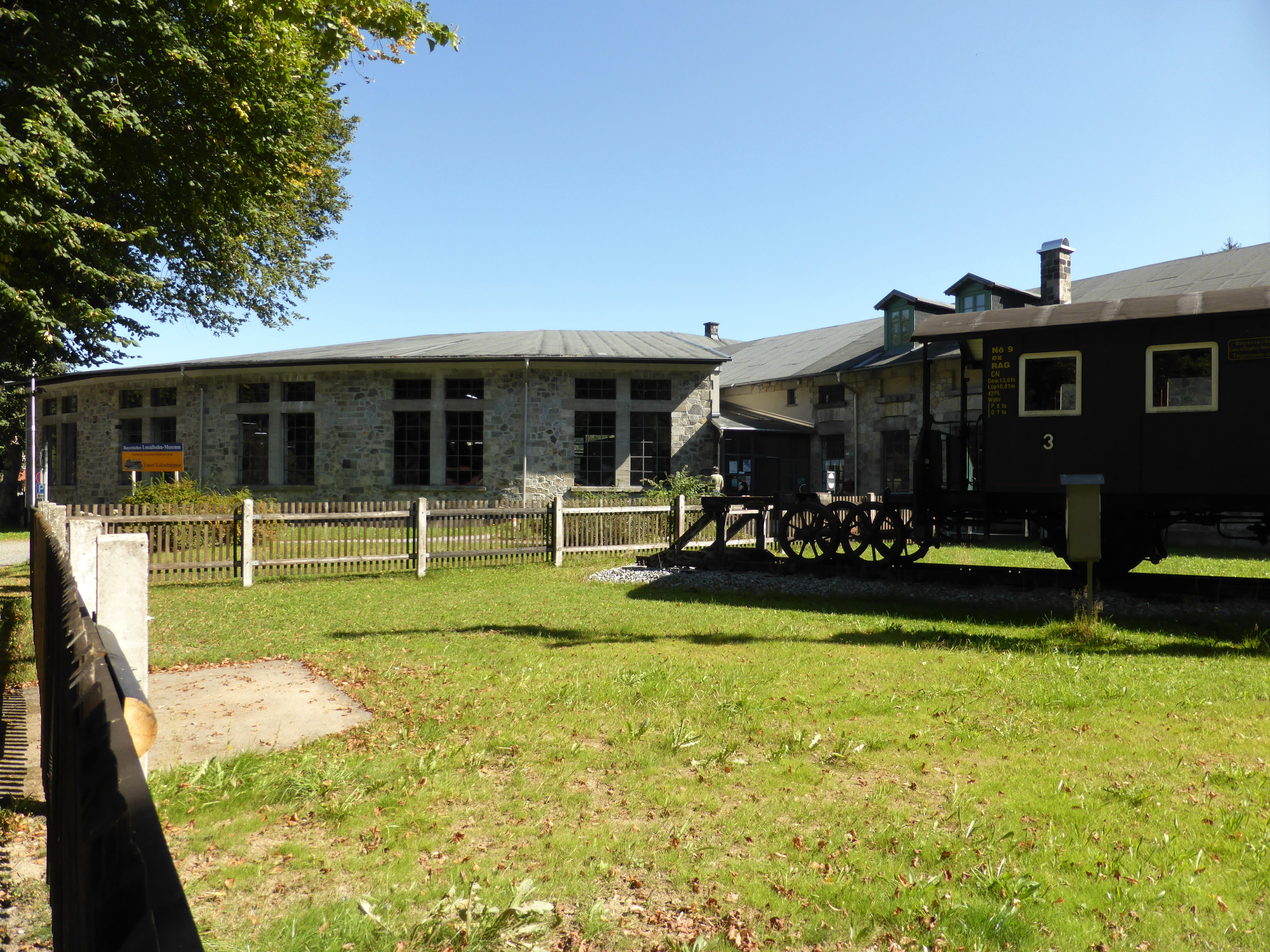 Ehemalige Lokomotiv- und Wagenhalle am Bahnhof Bayerisch Eisenstein. Heute Eisenbahnmuseum an der Bahnhofstraße 44.This is a photograph of an architectural monument.